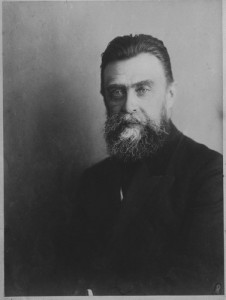 Фото Володимира Павловича Науменка, українського педагога, філолога і громадського діяча